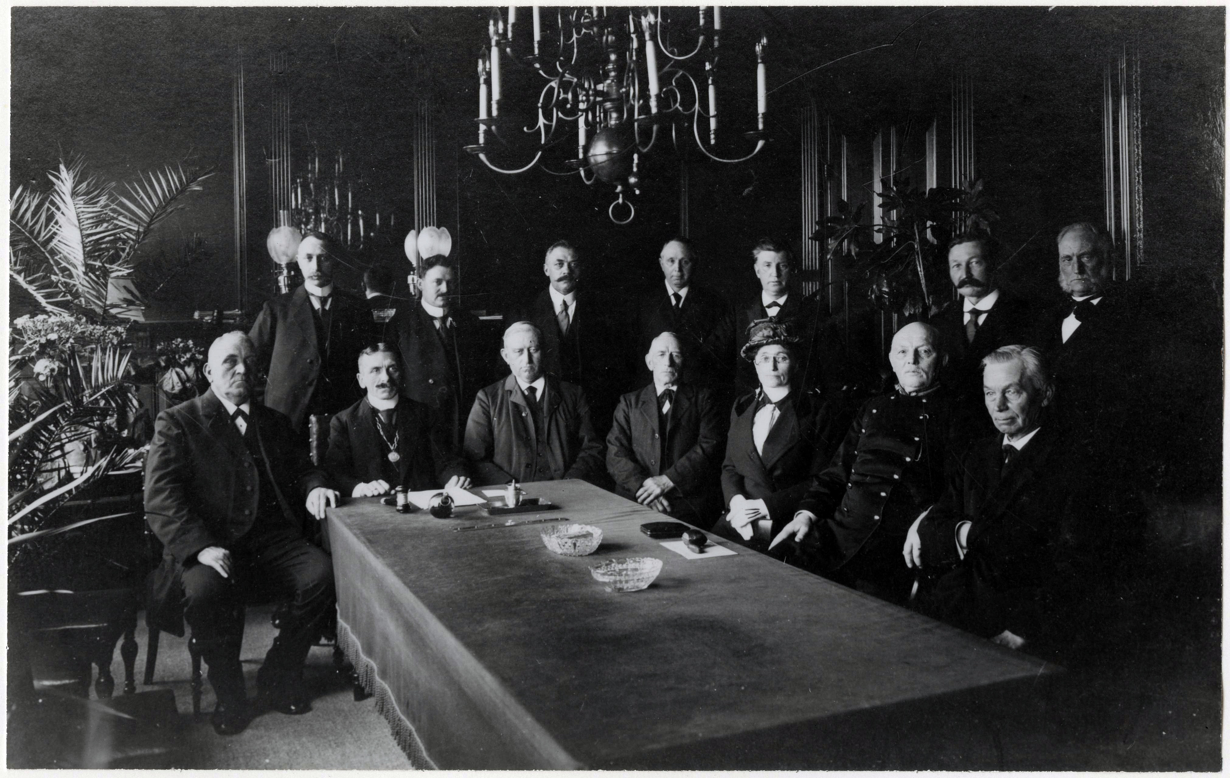 Gemeenteraad van Loosduinen in 1920, zittend, met ambtsketting, de burgemeester